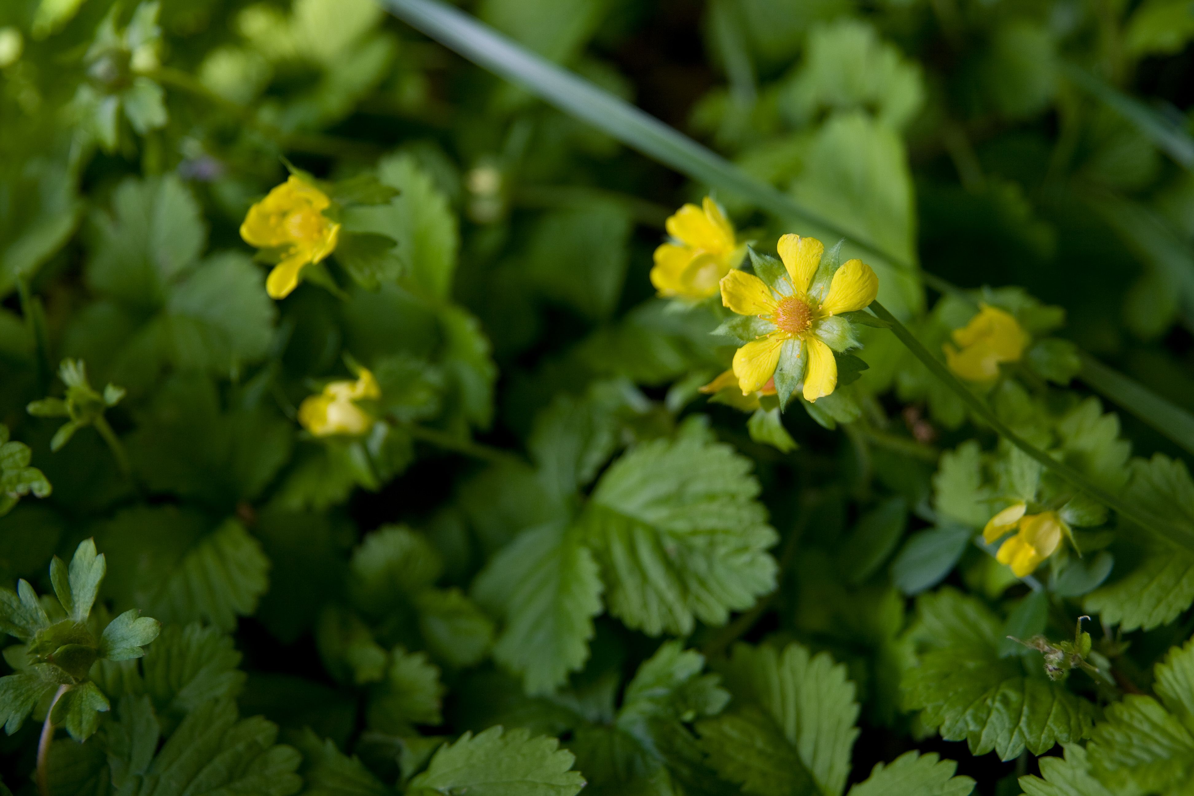 ヘビイチゴ (学名:Duchesnea chrysantha)